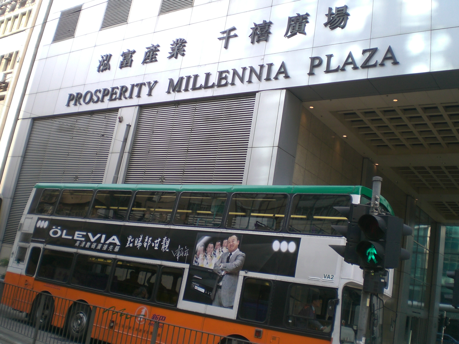 北角英皇道663號, 泓富產業 千禧廣場, 663 King's Road, North Point, Hong Kong.